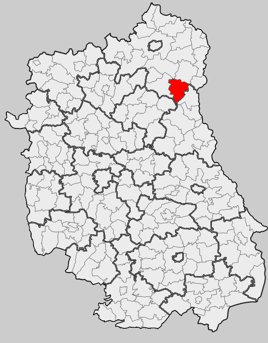 Map of gmina Sosnówka, Biała Podlaska county, Lublin voivodship Mapa gminy Sosnówka, powiat bialski, województwo lubelskie